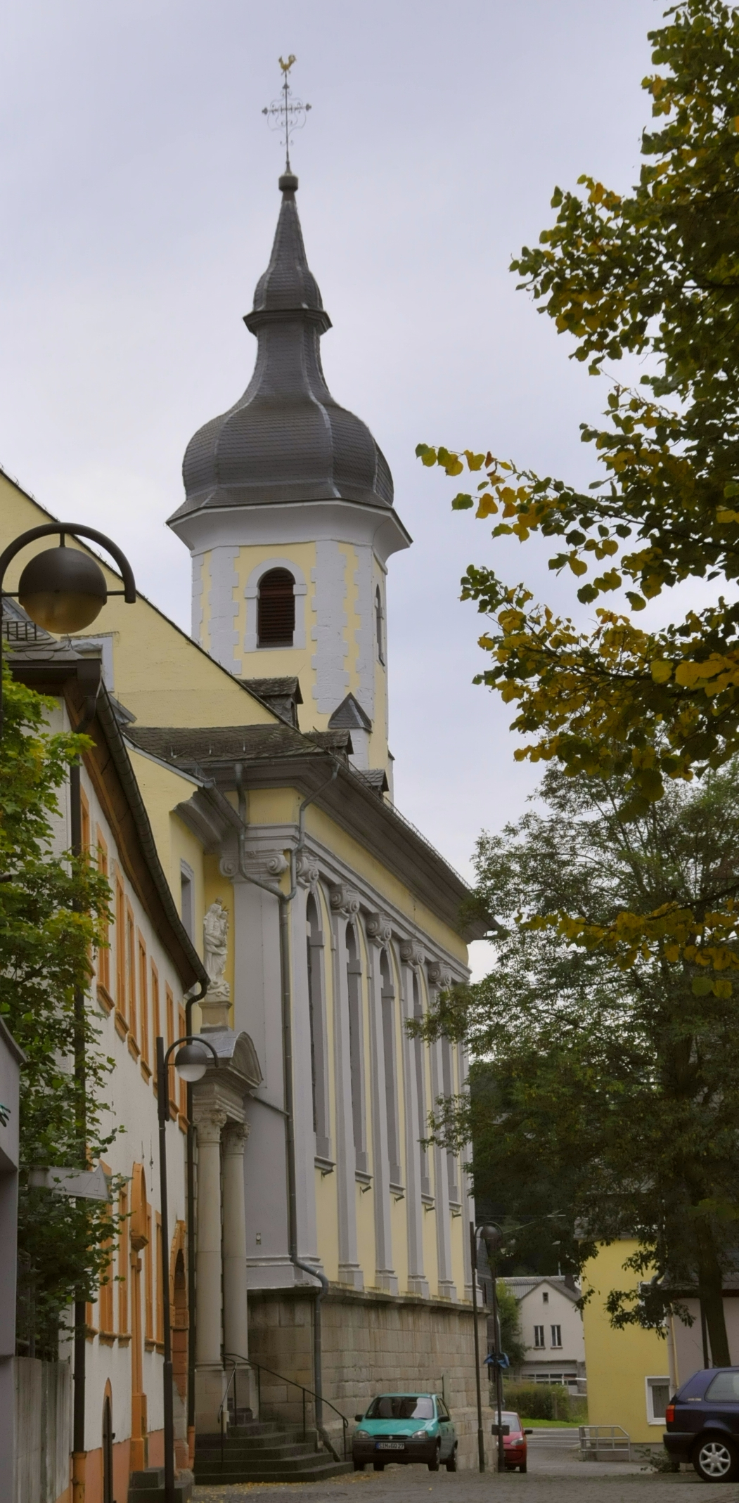 Simmern/Hunsrück, Josefskirche